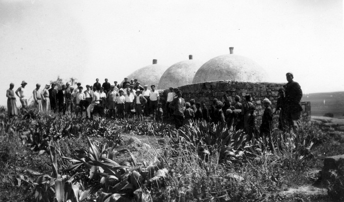 אגודת משוטטי א"י נבי שית בכפר שית כה אדר תרצ"א 1931 - חיים ברגר